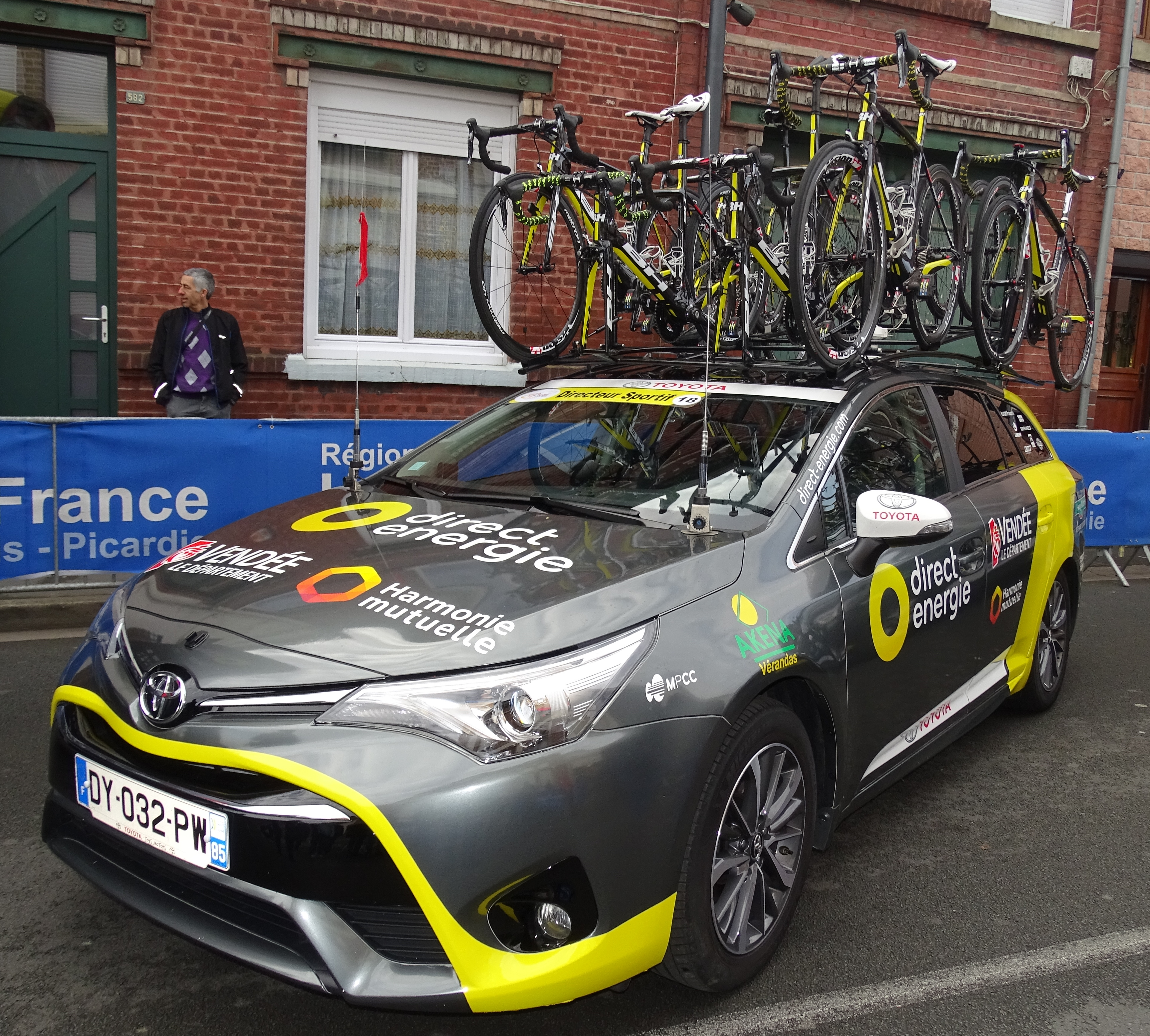 Reportage réalisé le jeudi 14 avril à l'occasion du départ et de l'arrivée du Grand Prix de Denain 2016 à Denain, Nord, Nord-Pas-de-Calais-Picardie, France.